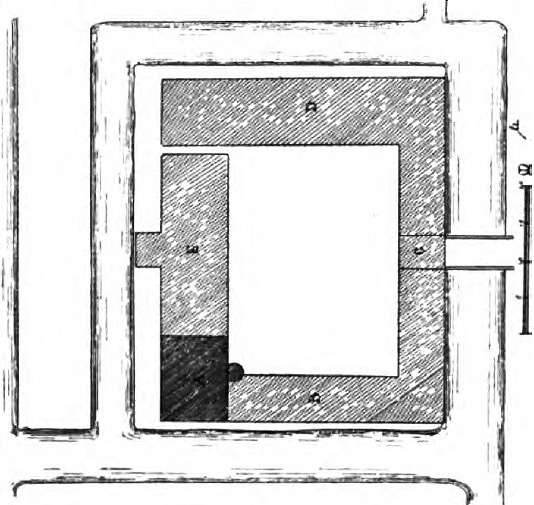 Lageplan des Hauses Holtheyde in Wachtendonk